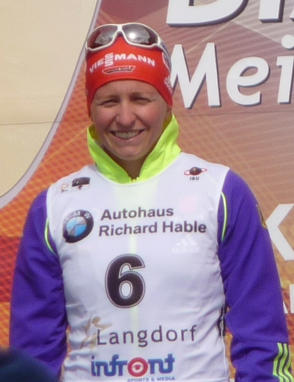 Franziska Hildebrand bei der Deutschen Biathlon-Meisterschaft 2015